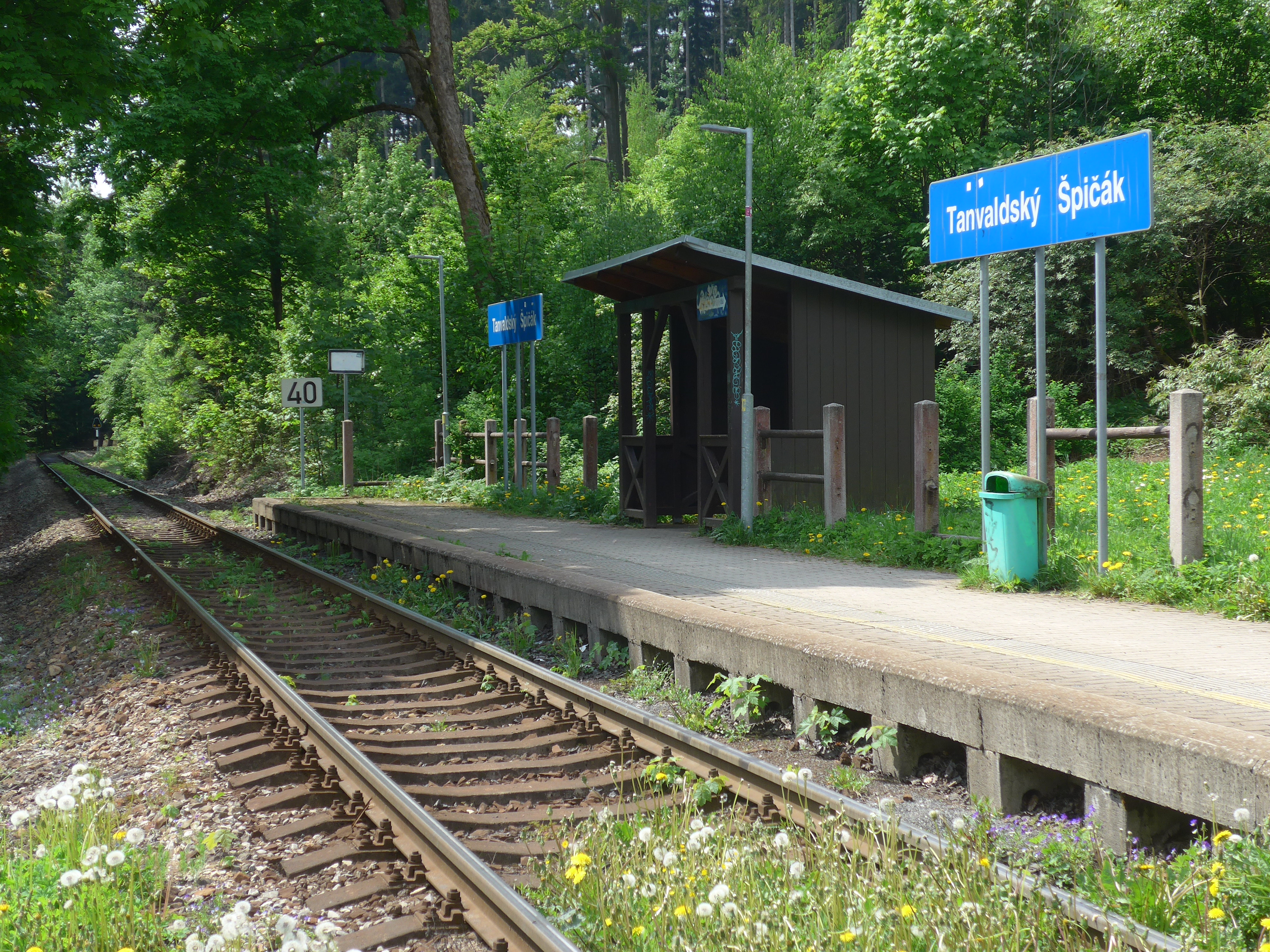 Tanvaldský Špičák (železniční stanice), pohled směrem ke Smržovce